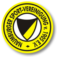 Logo Naumburg 05